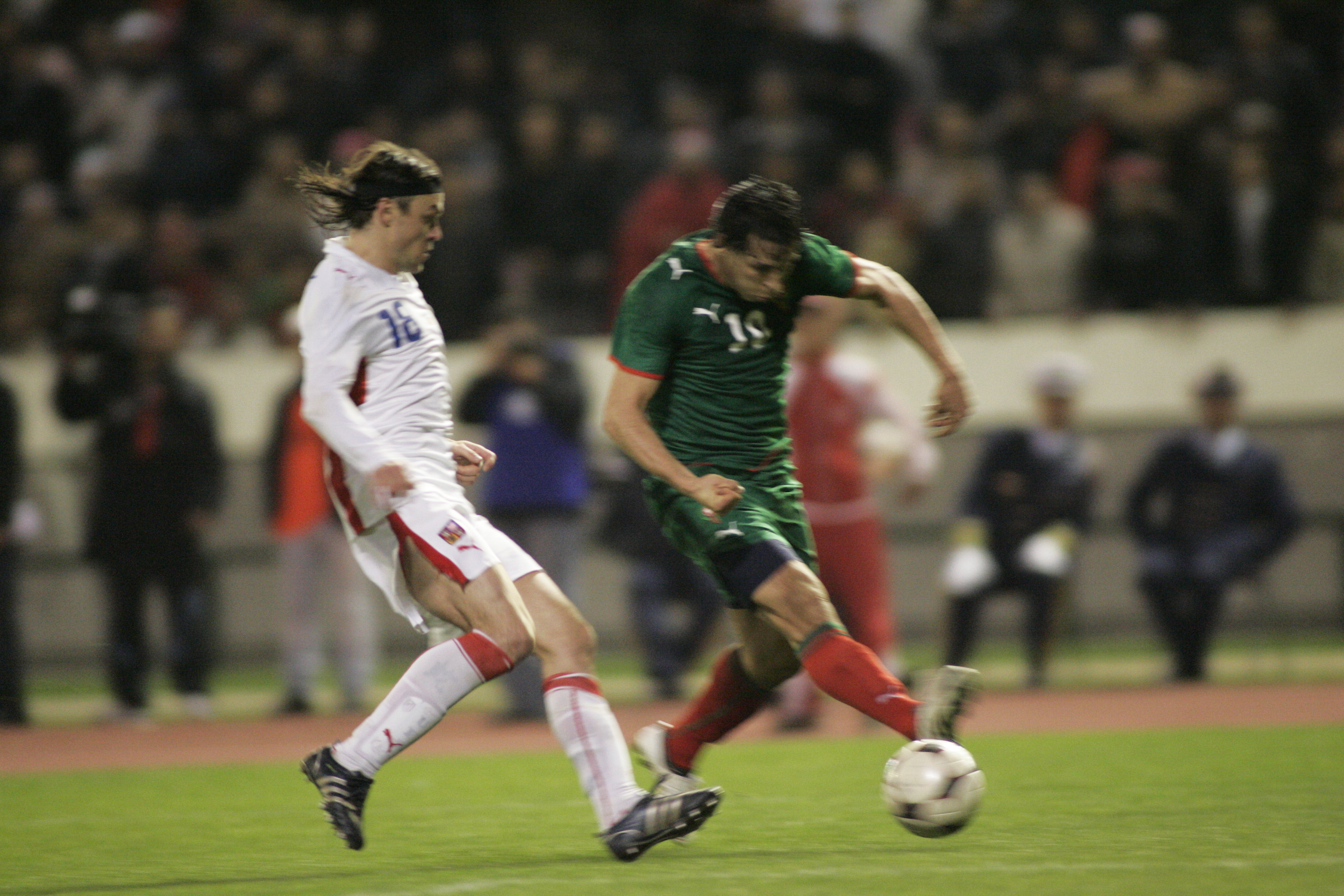 Tomas ujfalusi. mounir el hamdaoui